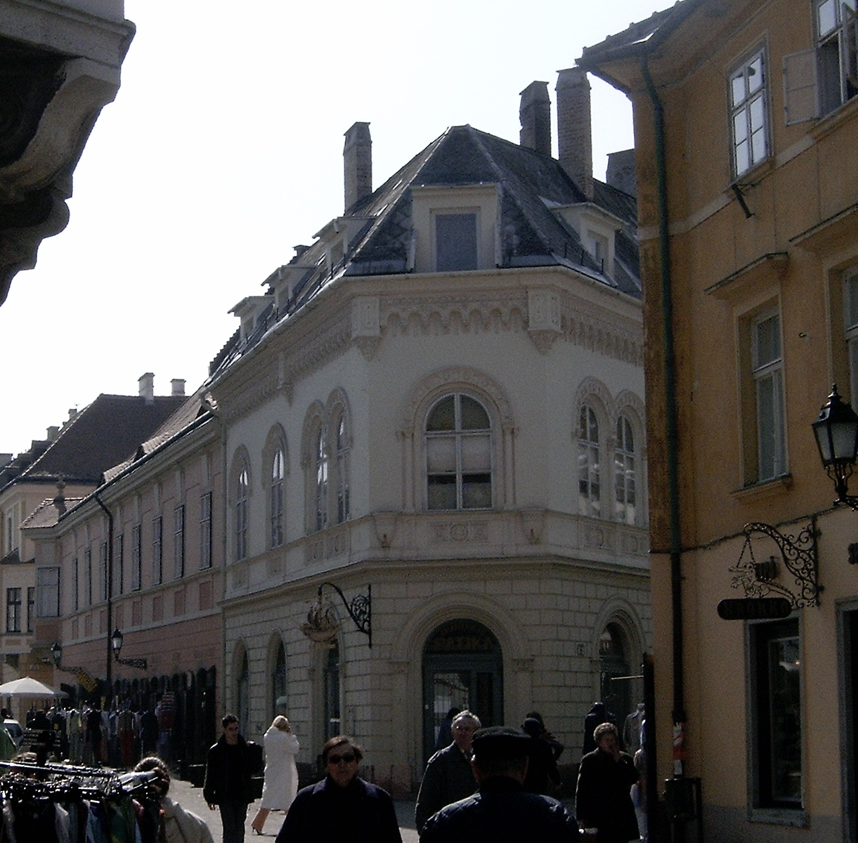 A győri Aranyhajó-ház. Egy romantikus épületben működik az Aranyhajó-gyógyszertár. Falán tengeri vitorláshajót ábrázoló cégér, Schima Bandi győri iparművész alkotása. - Győr, Jedlik Ányos utca 16